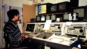 La régie finale d'Aqui Tv à Proissans (Dordogne, Aquitaine, France).